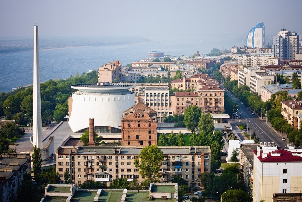 Мельница Гергардта